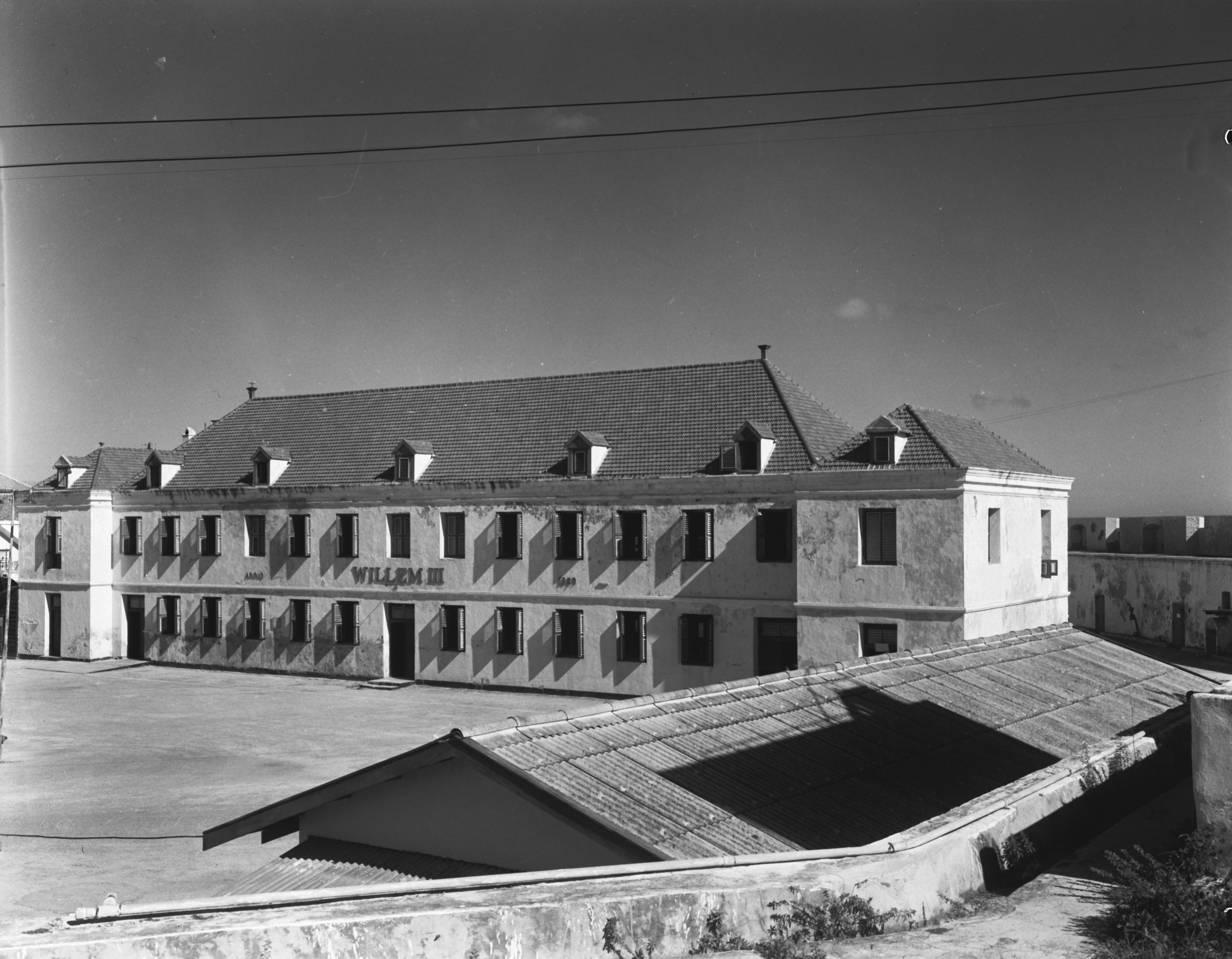 Punda, Waterfort, kazerne Willem IIIOnderwerp: forten, kazerne